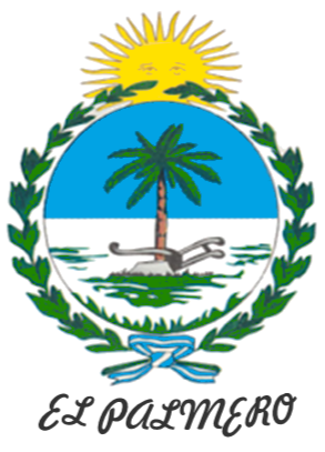 Escudo de la localidad de El Palmero, en Cartagena (Región de Murcia)